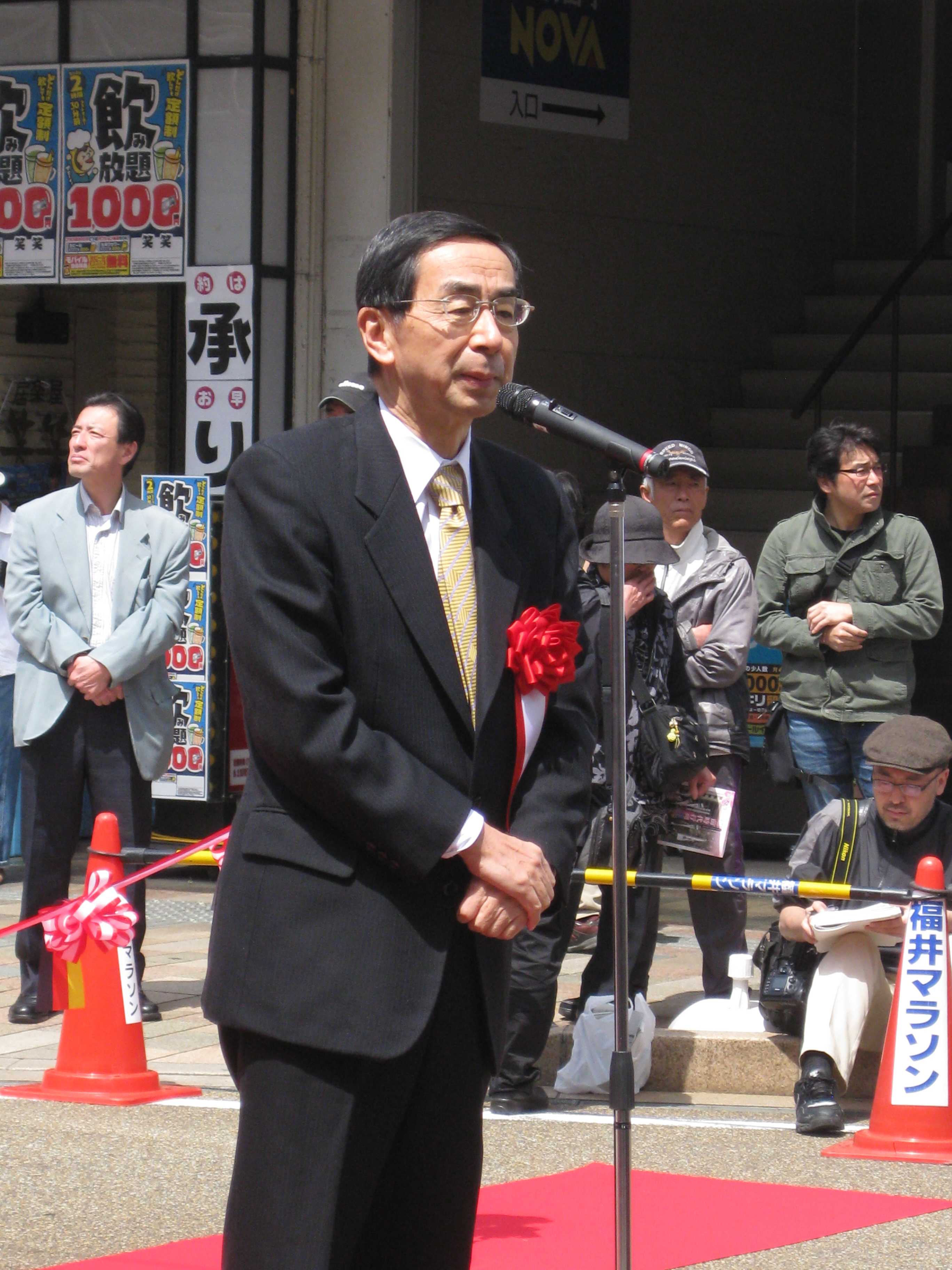 福井県知事の西川一誠です。 2014年4月12日福井鉄道のレトラム出発式の際に撮影